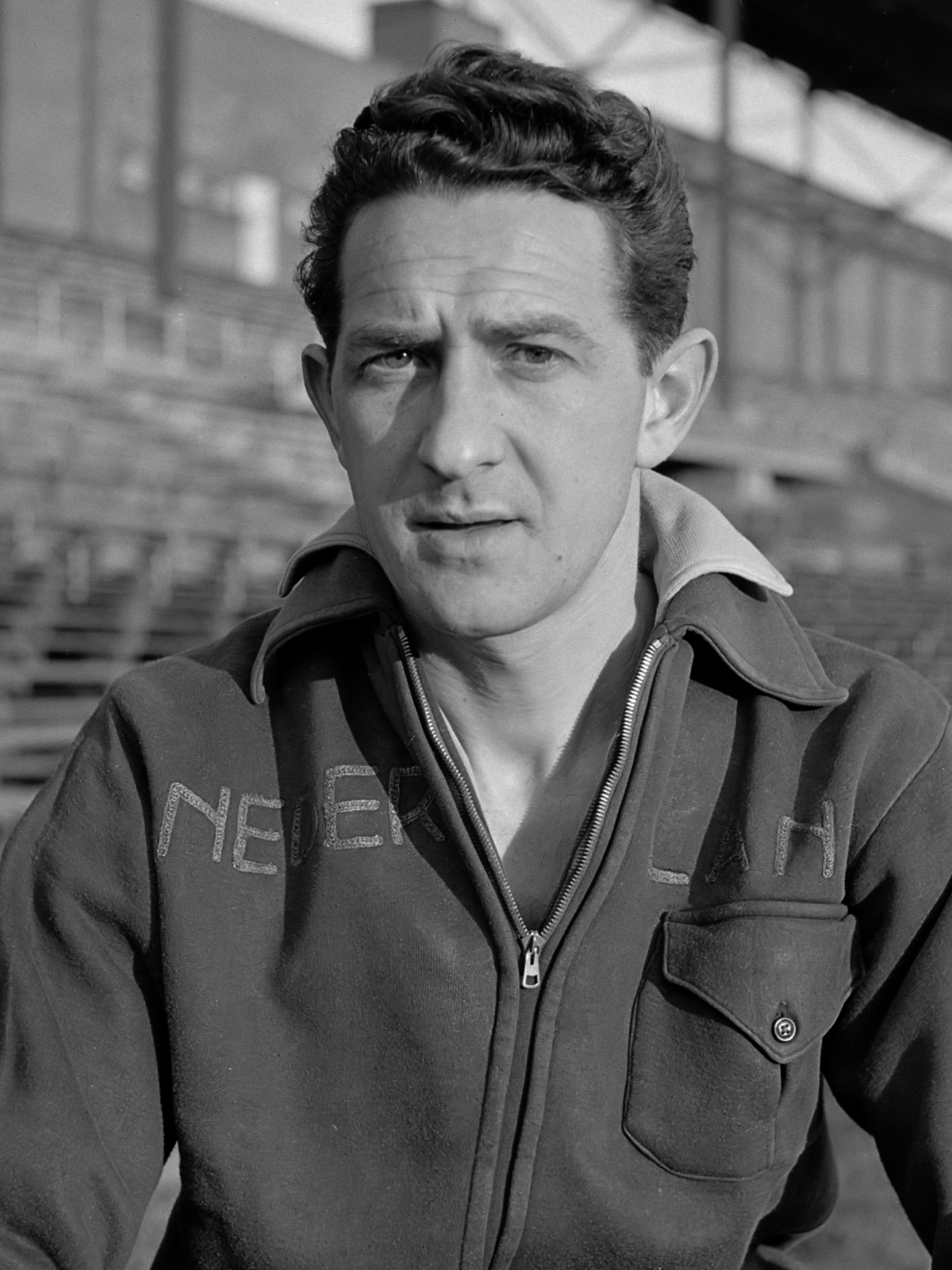 Nederlands voetbalelftal 1951. Anton 'Charley' van de Weerd (Wageningen) in het Olympisch Stadion in Amsterdam, enige dagen na de oefeninterland tegen België 24 april 1951